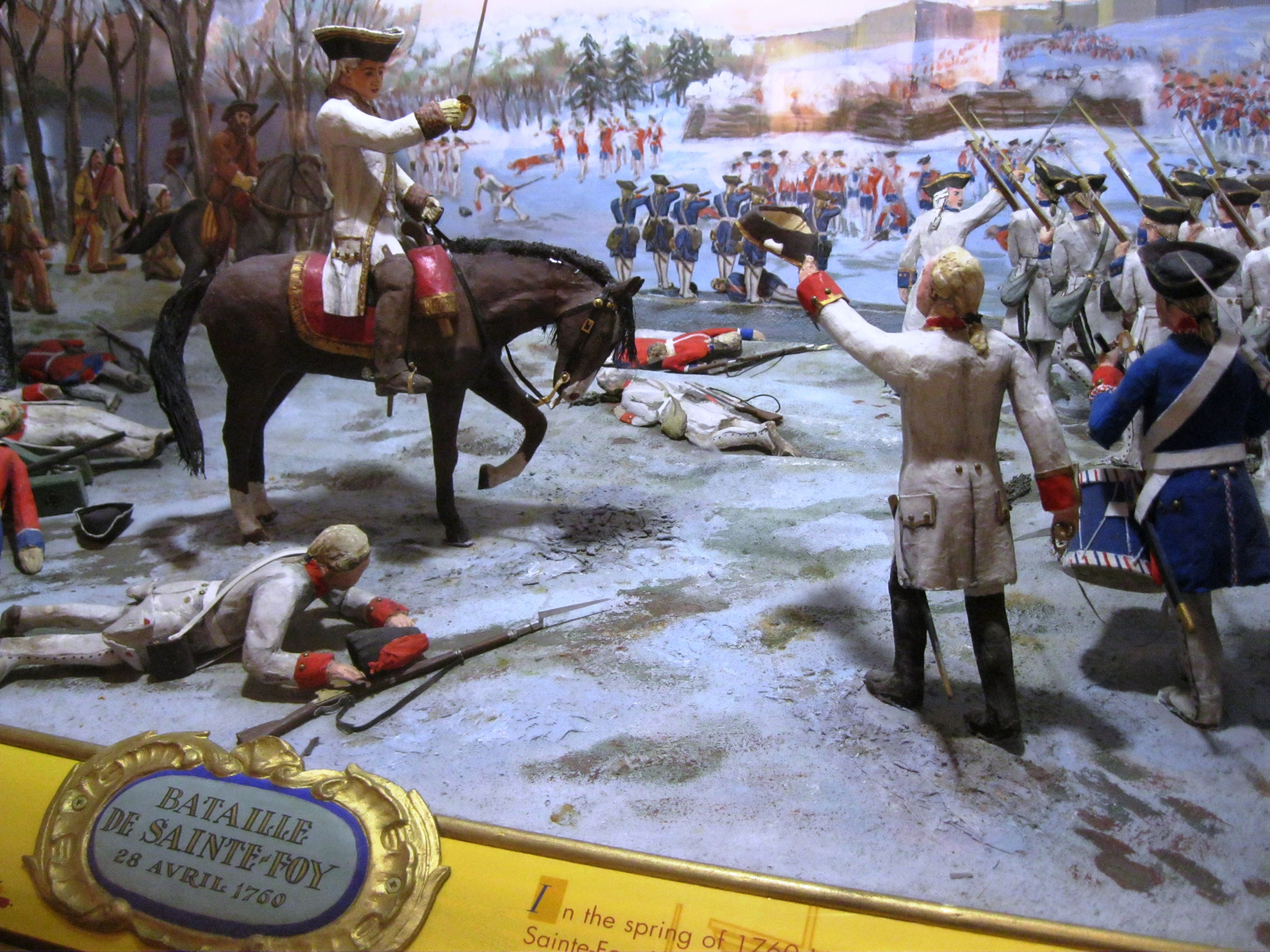 Citadelle de Québec